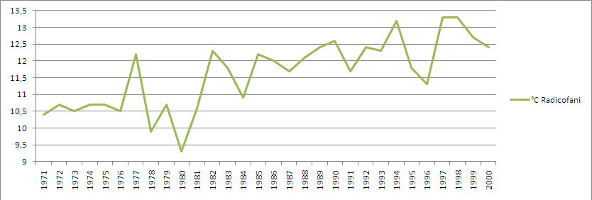 Stazione meteorologica di Radicofani: andamento della temperatura media annua dal 1971 al 2000.